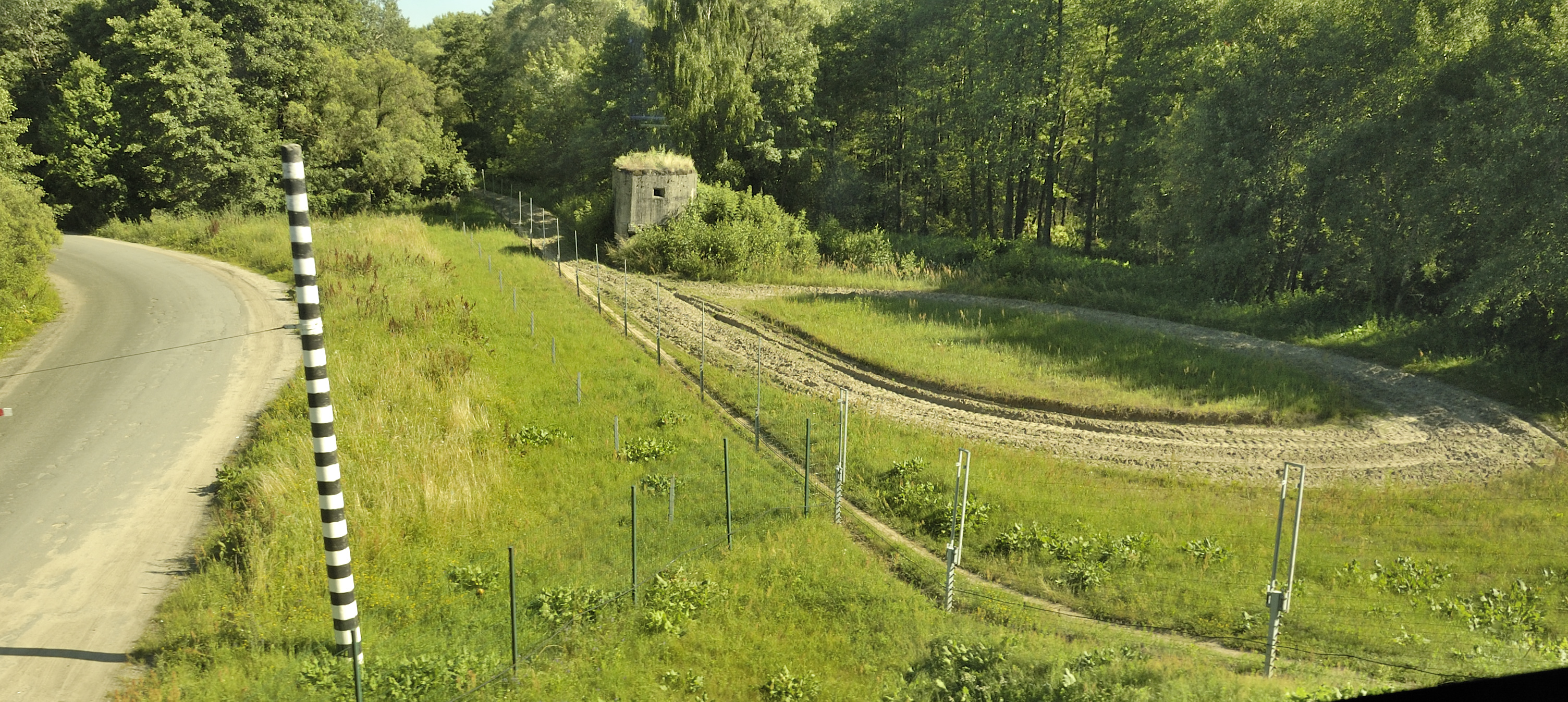 Заграждение, КСП и ДОТ на белорусско-польской границе